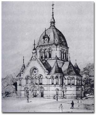 Erlöserkirche Hamburg-Borgfelde nach Entwurf von Georg Thielen